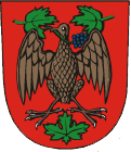 znak města Dolní Kounice, okres Brno-venkov